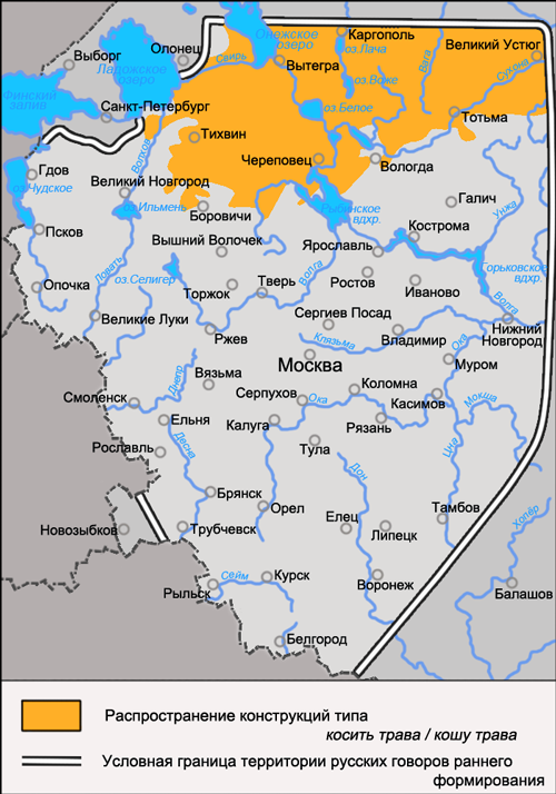 Карта распространения диалектного явления русского языка в области синтаксиса: употребление конструкций типа косить трава / кошу трава. Источник: Бромлей С. В., Булатова Л. Н., Захарова К. Ф. и др. Русская диалектология / Под ред. Л. Л. Касаткина — 2-е изд., перераб. — М.: Просвещение, 1989. — ISBN 5-09-000870-1, с. 131